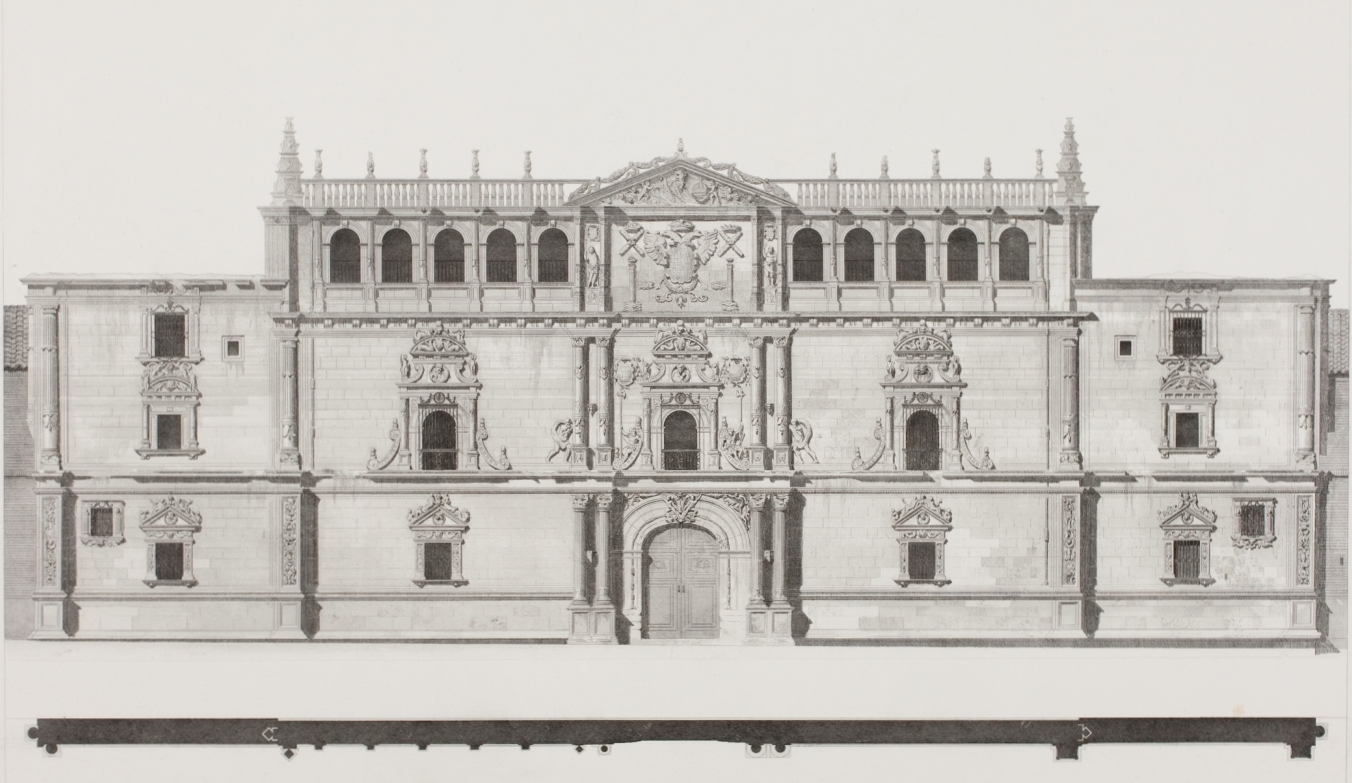 Aguafuerte de la fachada principal del Colegio Mayor de San Ildefonso de la Universidad de Alcalá (Comunidad de Madrid - España). Dibujo de José Díaz de Bustamante, grabado por Emilio Ancelet, para la serie de estampas "Monumentos Arquitectónicos de España", publicada en Madrid entre 1856-1881.